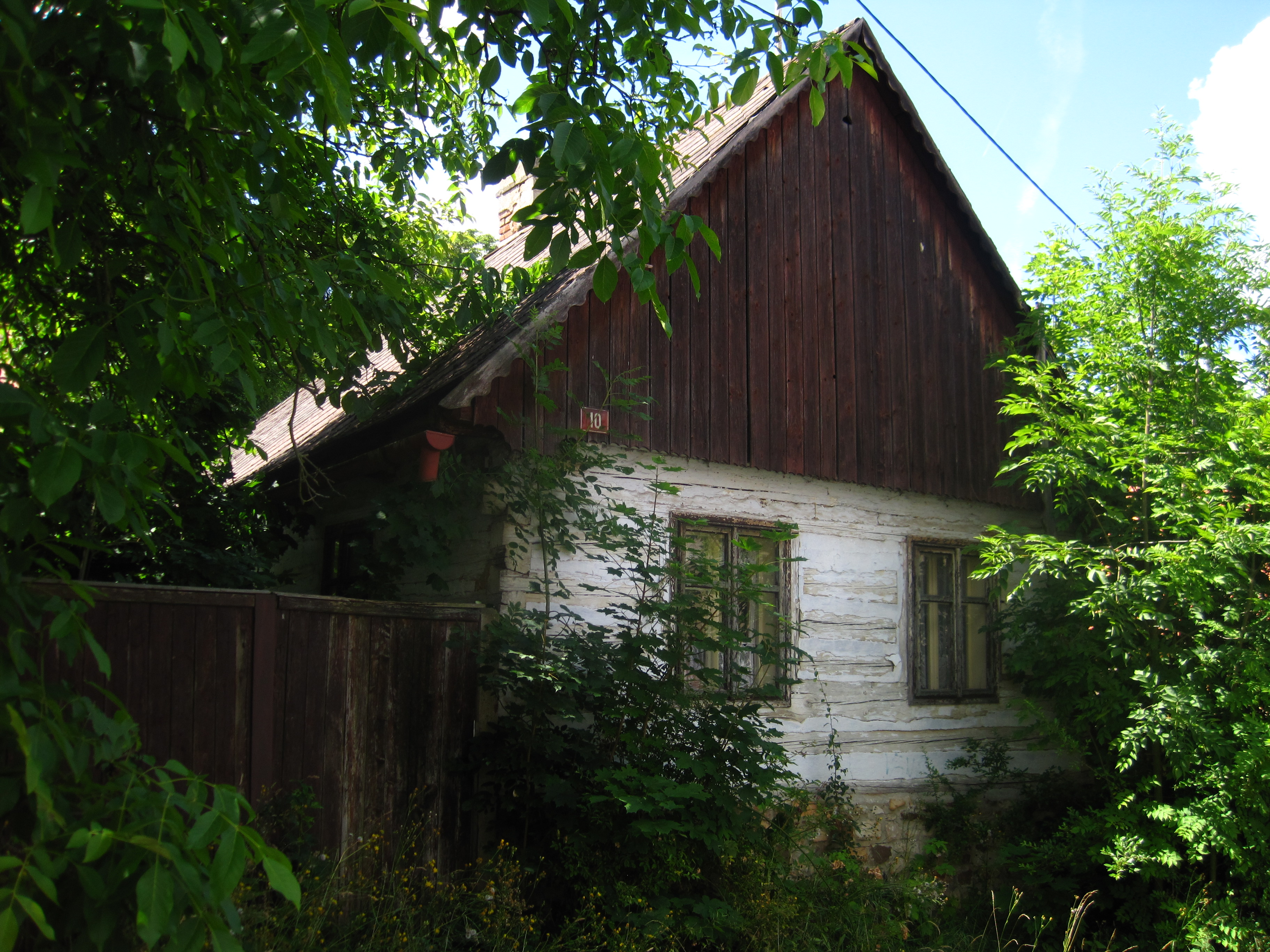 Usedlost čp. 10, Osov 10, Osov.